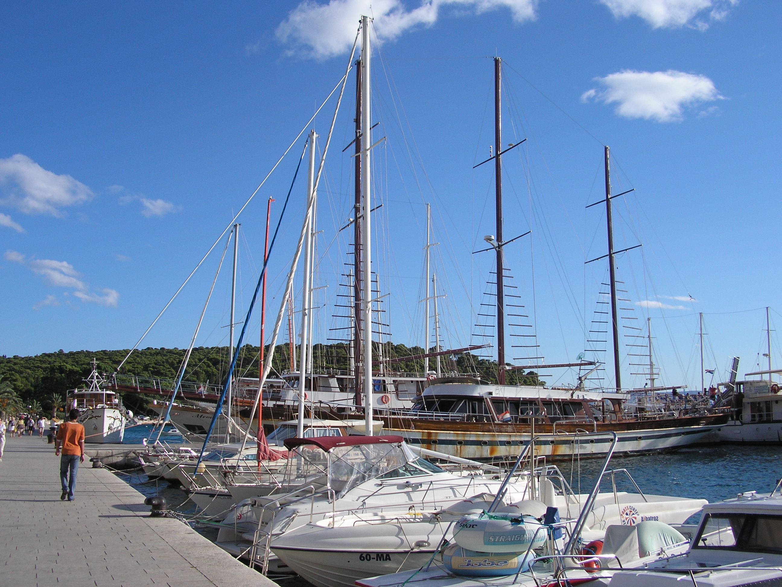 Harbour in Makarska (Croatia)